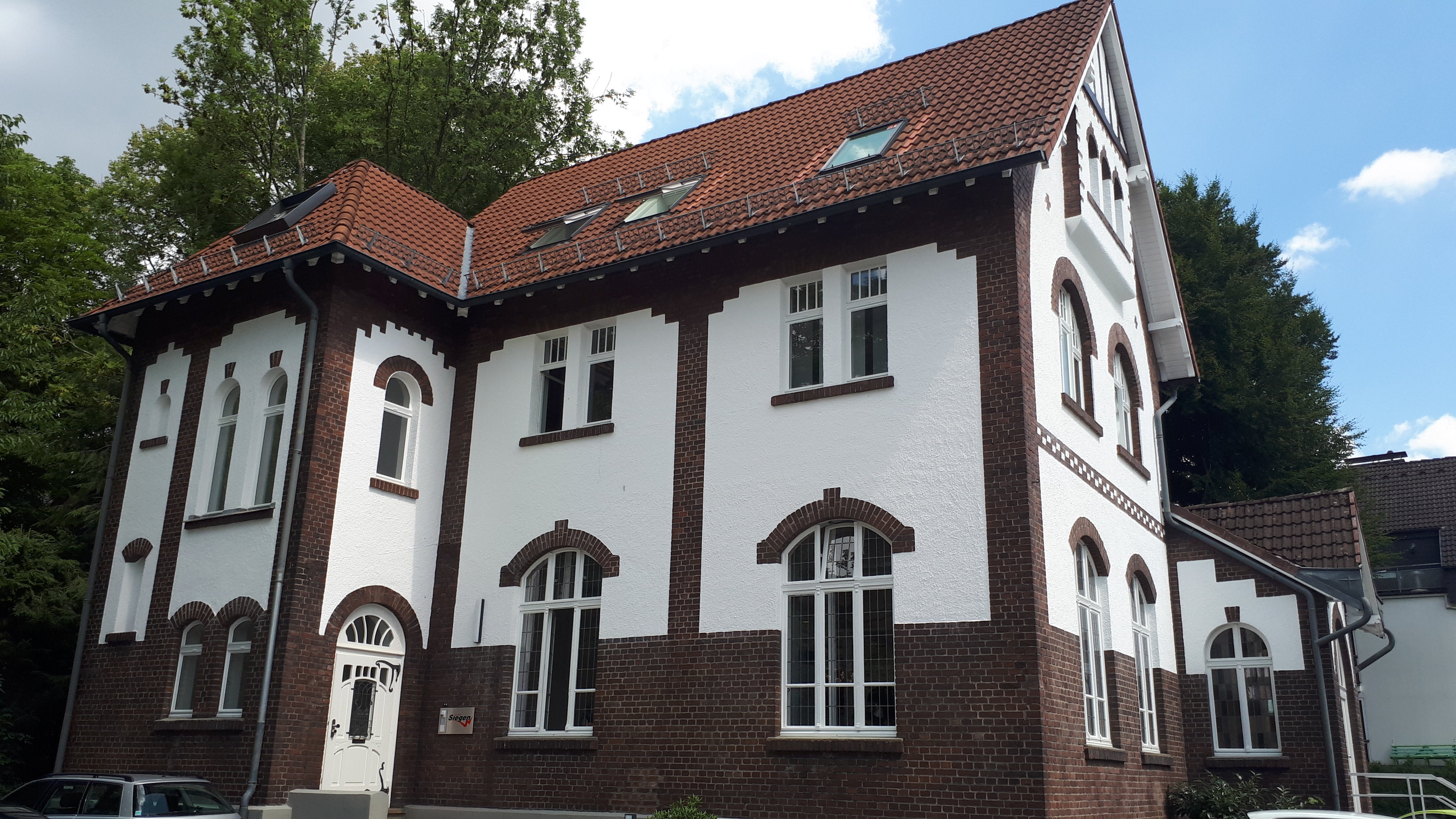 Funkhaus in der Siegener Tiergartenstraße